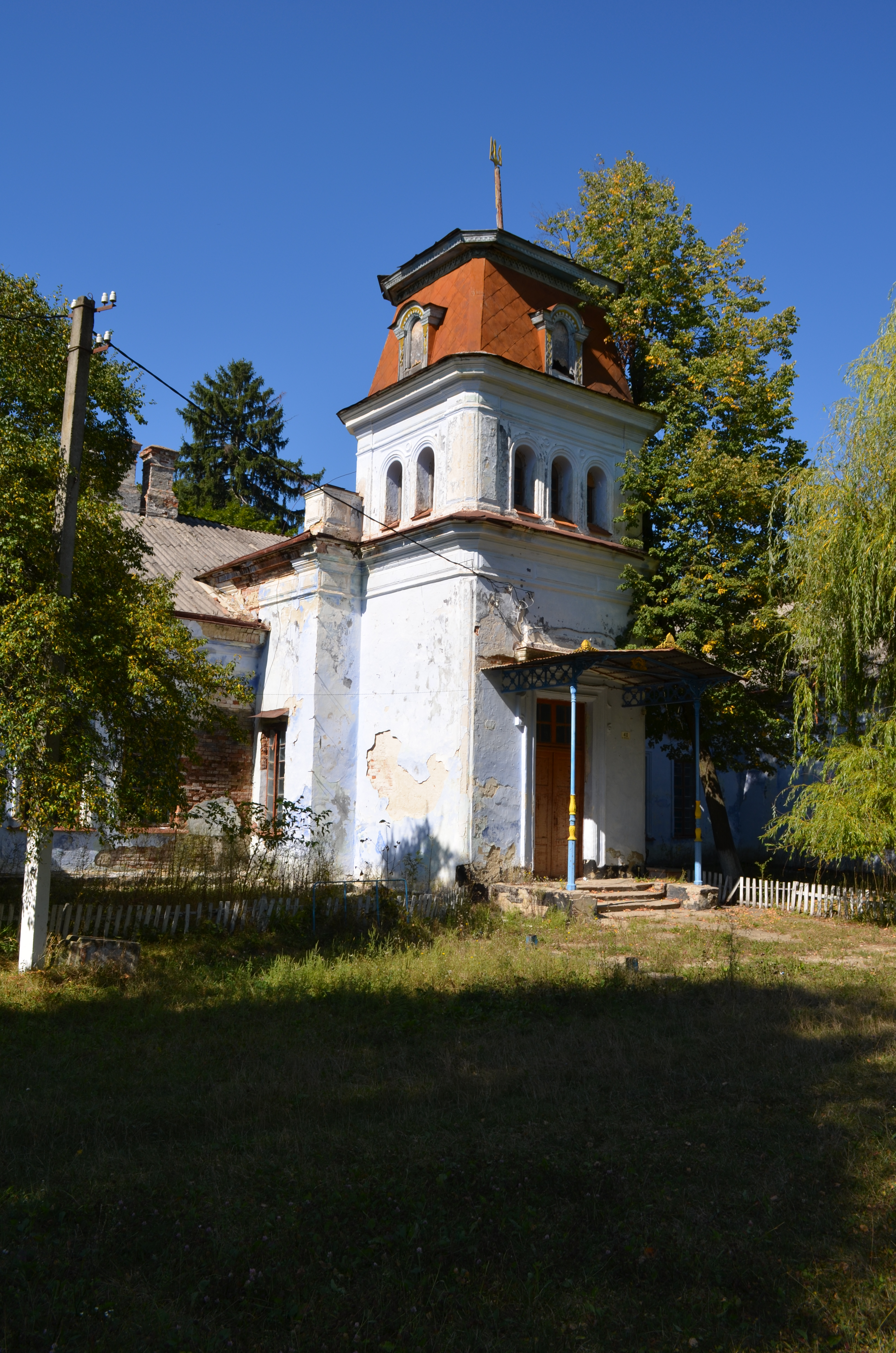 Палац у с. Гонорівка